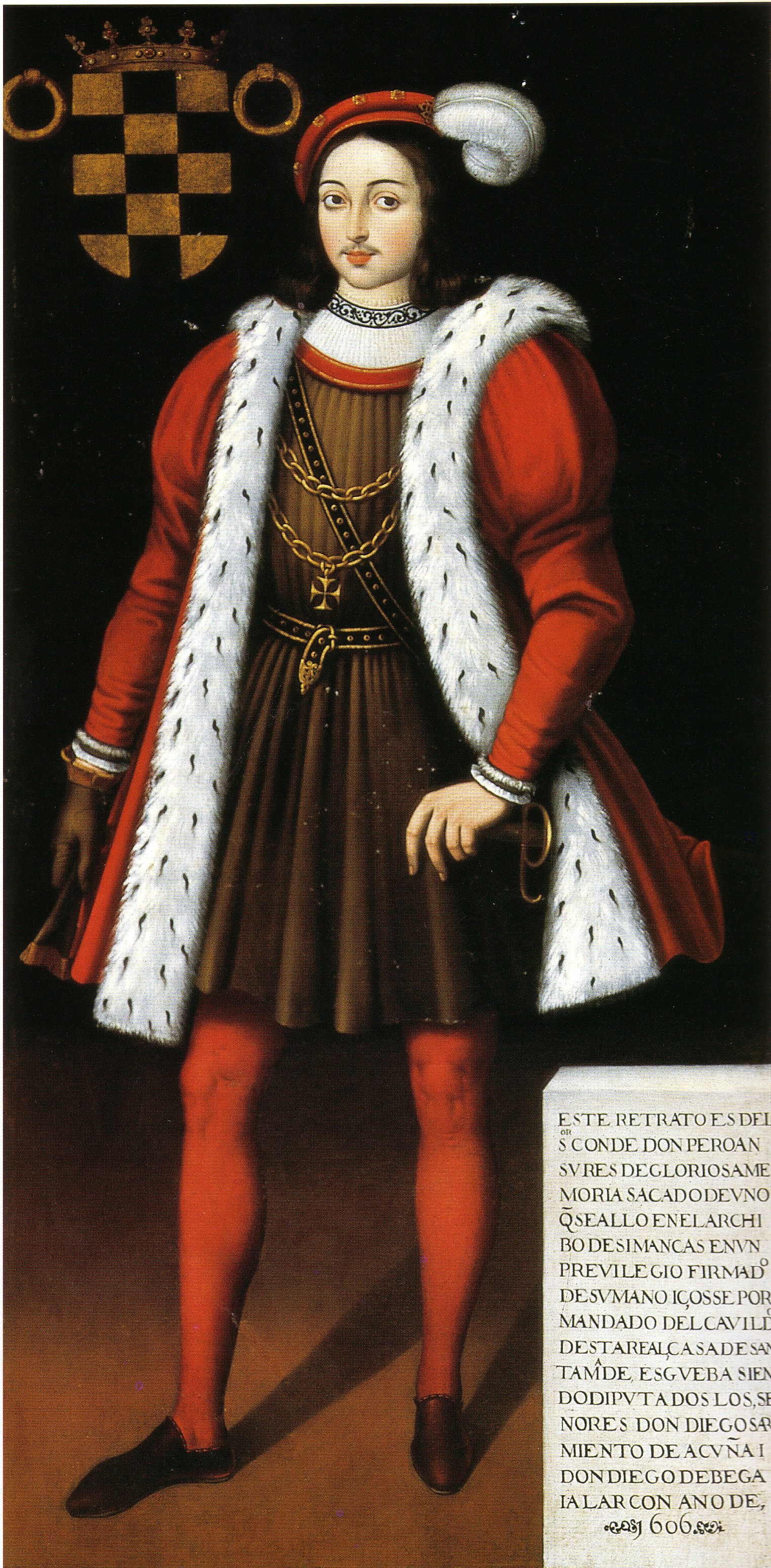 Retrato del Conde Ansurez, Sala de Recepciones del Ayuntamiento de Valladolid